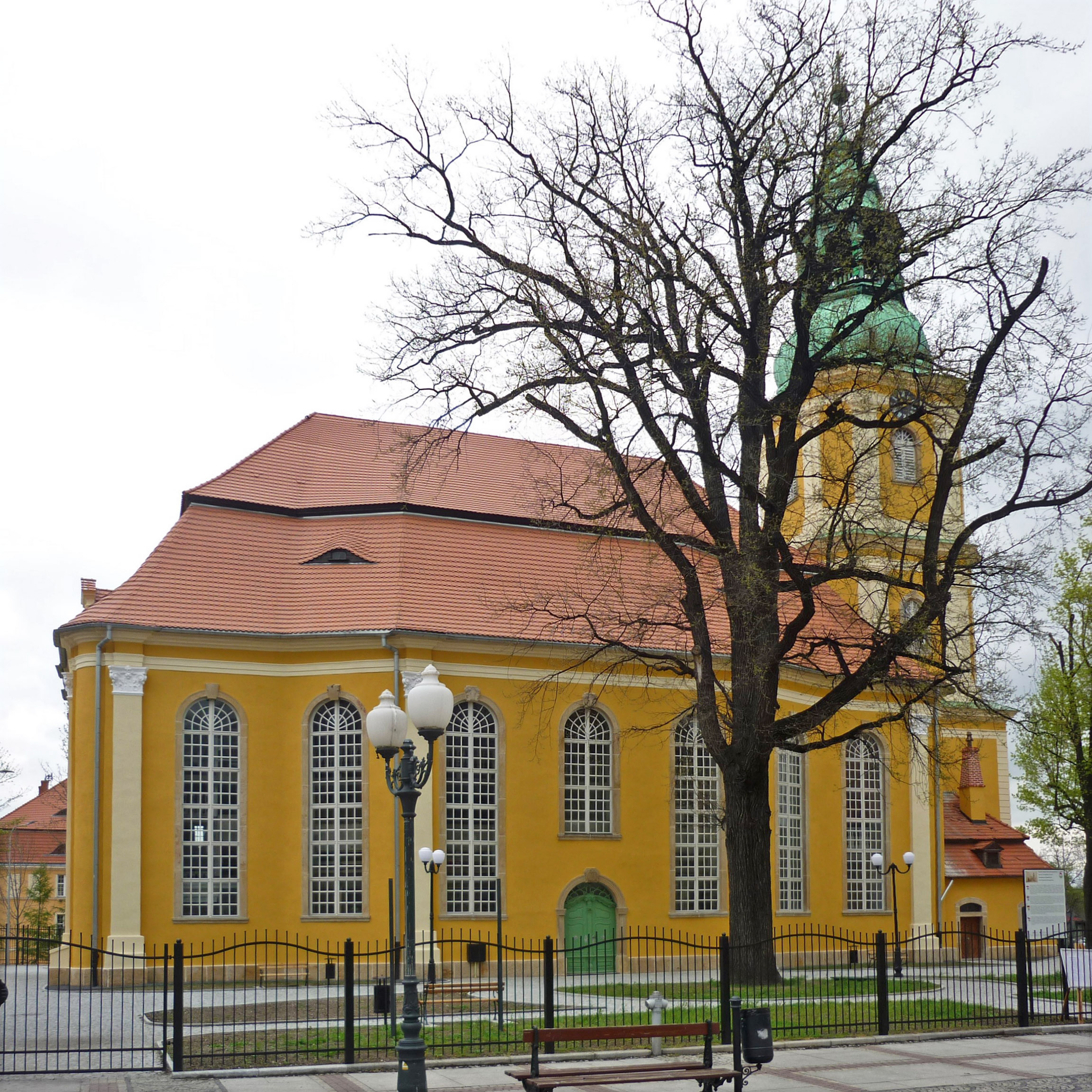 Evangelische Erlöserkirche in Bad Warmbrunn (Cieplice Śląskie-Zdrój)